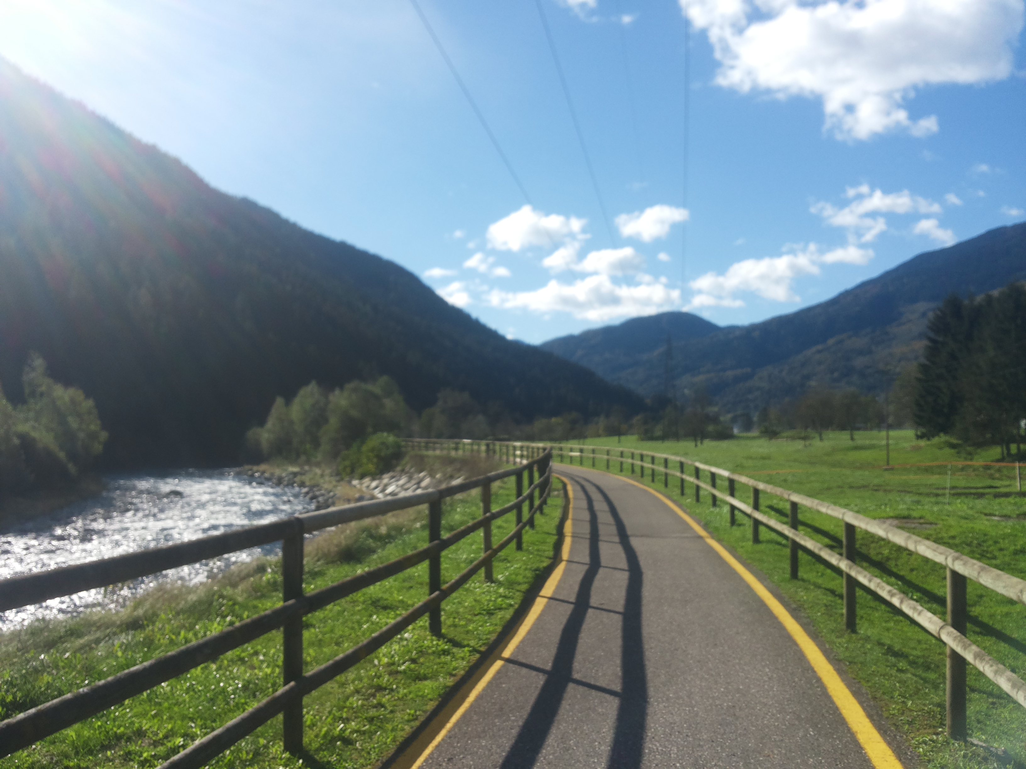 Tratto della ciclopista della Val Rendena